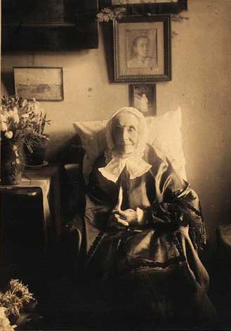 Ane Hedvig Brøndum (16.01.1826-17.04.1916) født Sørensdatter Møller, gift med Erik Andersen Brøndum, Skagen. Formentlig fotograferet på 90-års fødselsdagen.